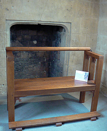 Le banc à tournis, appelé aussi banc double, dispose d'un dossier articulé qui bascule d'un bord à l'autre du banc sur un plan longitudinal, permettant d'être face ou dos au feu de cheminée sans avoir à tourner le meuble. Meuble dans une chambre reconstituée dans la Tour Jean Sans Peur.